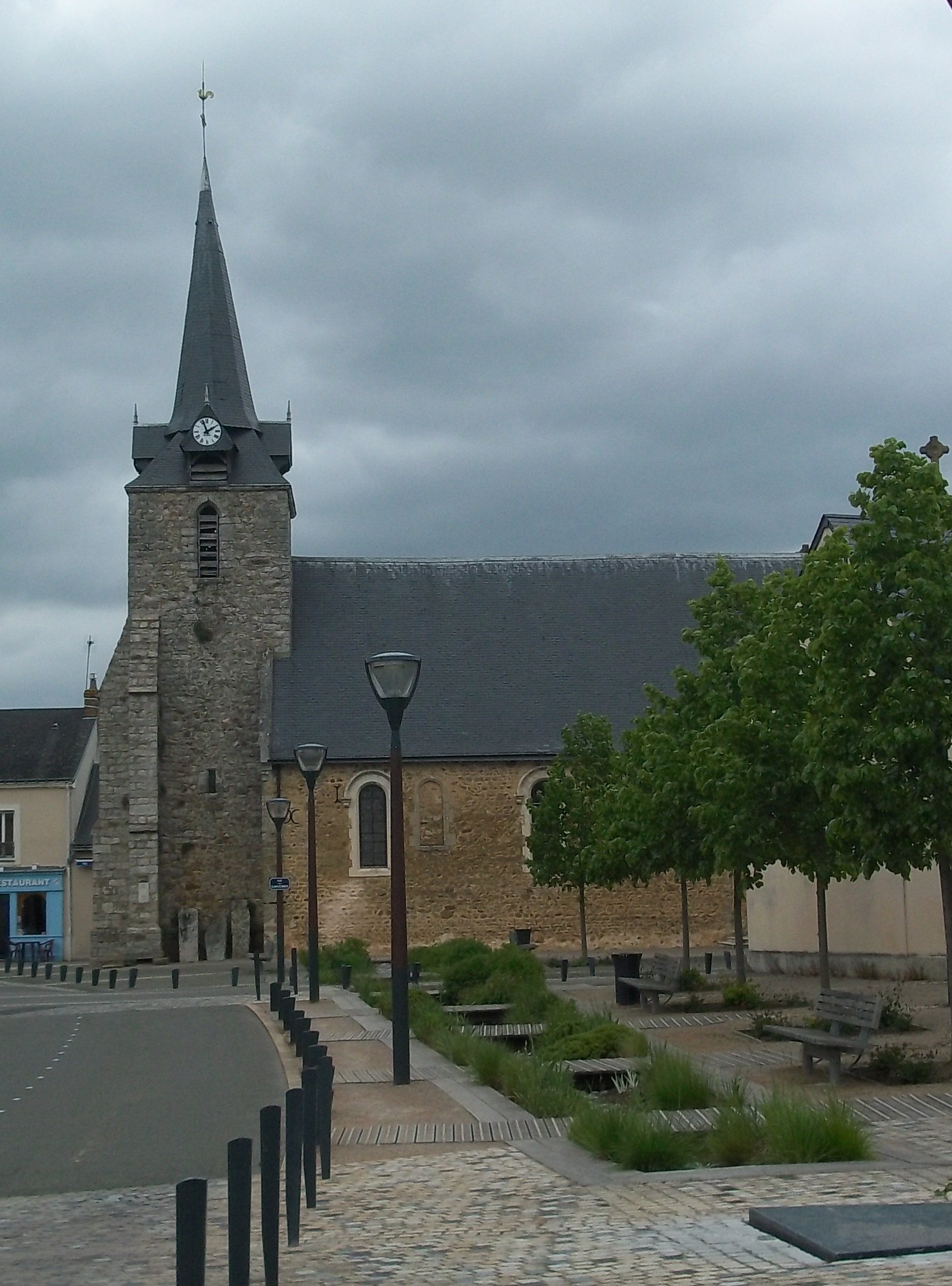 l'église et le mail